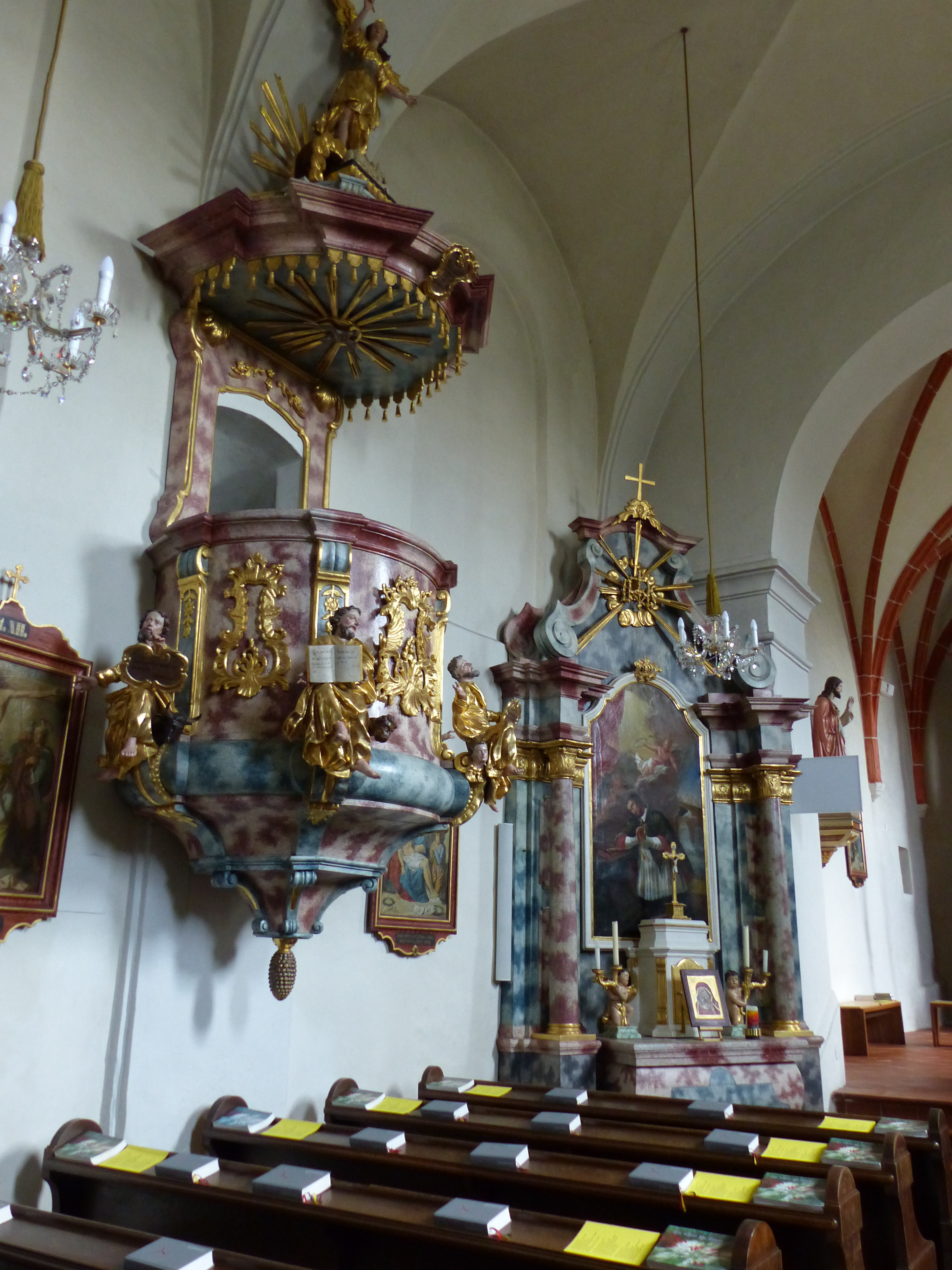 Innenbereich Nikolauskirche Neumarkt im Tauchental